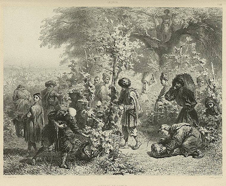 Georgie. Vendanges en Kakhetie.